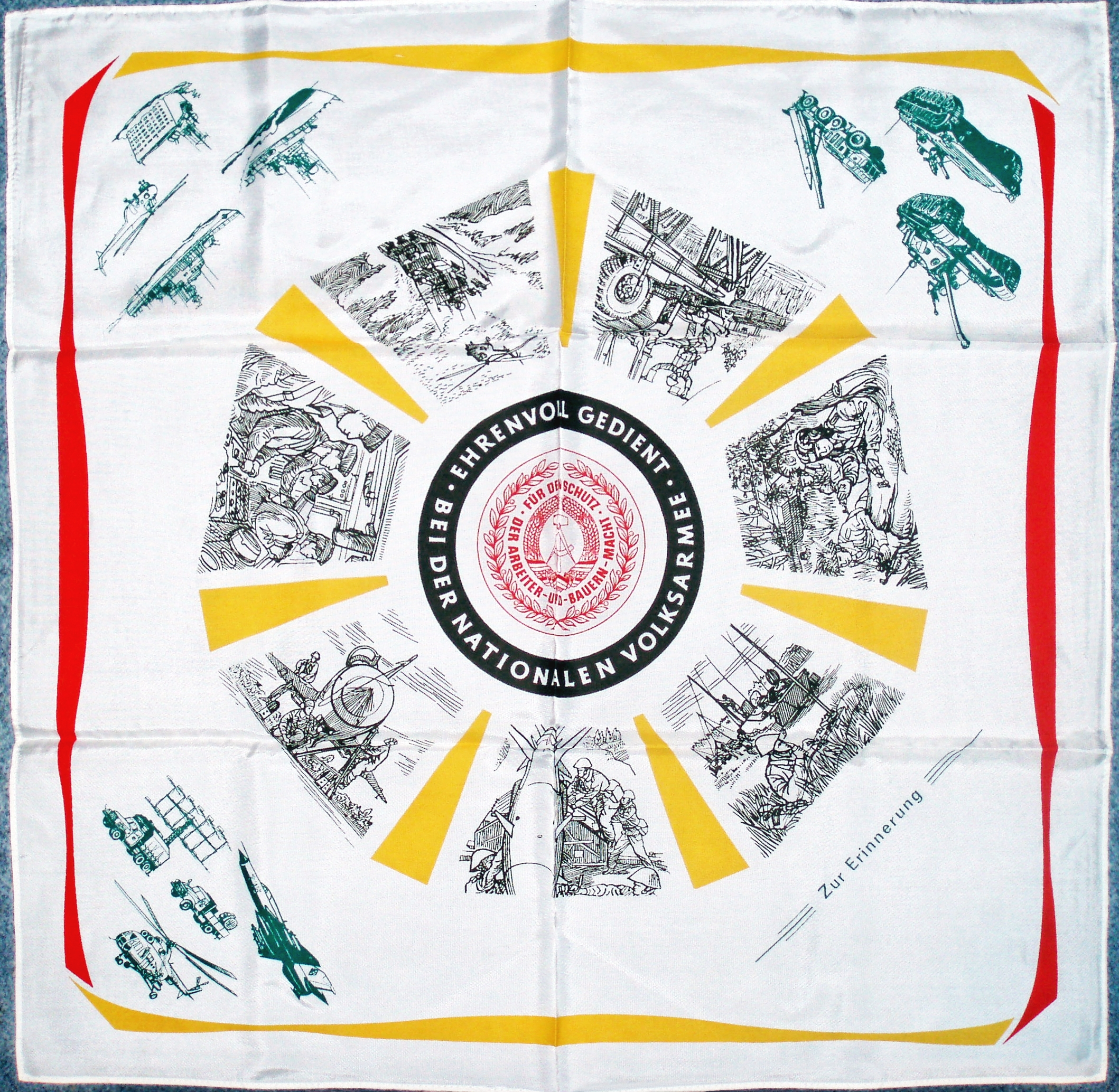 Šátek rezervistů bývalé NVA